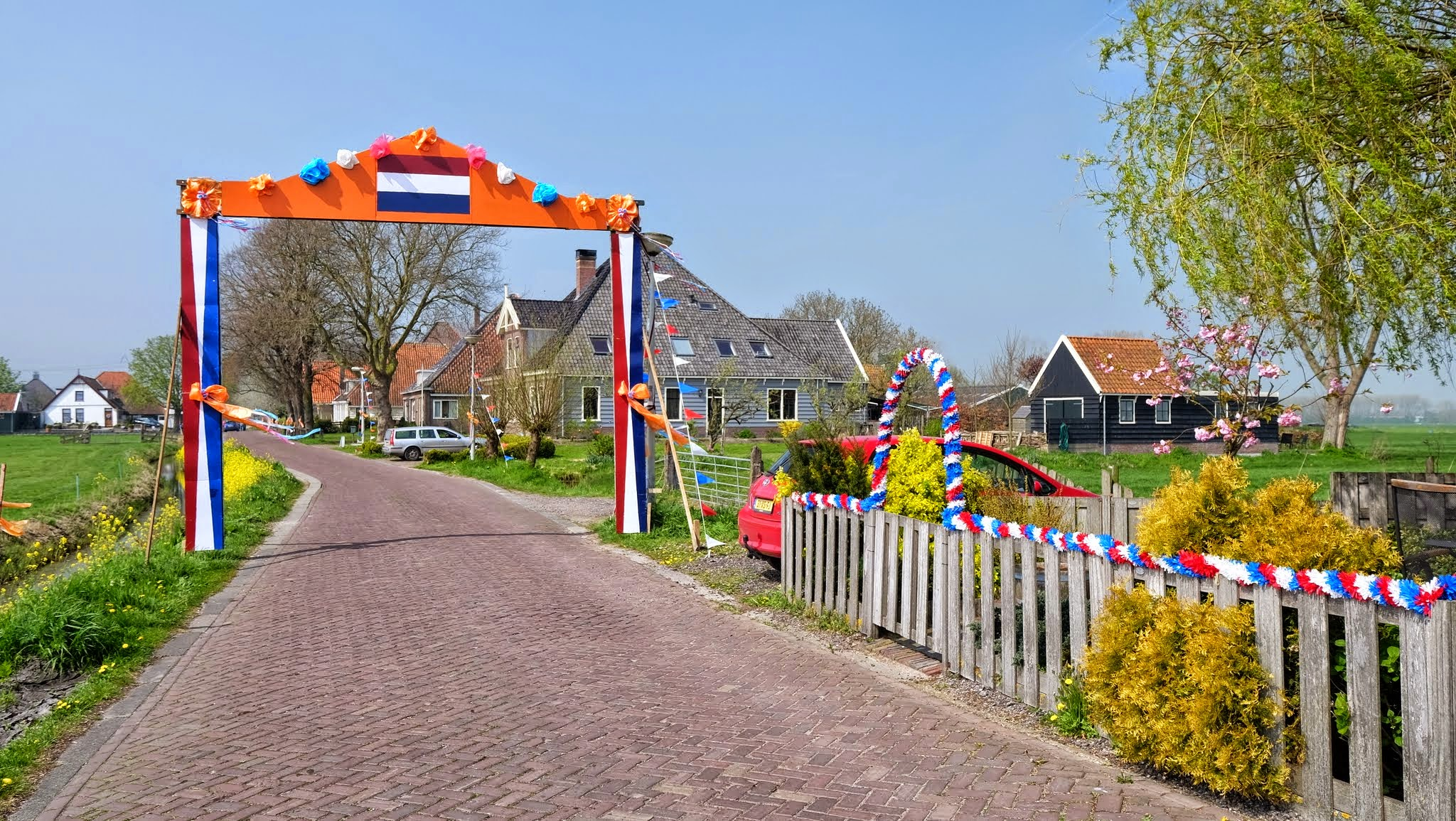 Waterland, Amsterdam, Netherlands